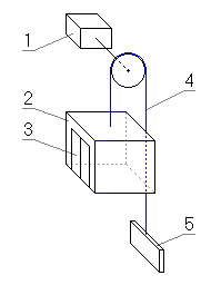 Skemo de lifto. (Ŝakto ne estas montrita) 1 - Motoro kun meĥanika kondukilo; 2 - Kajuto; 3 - Pordoj; 4 - Kablo; 5 - Kontraŭpezilo. Mi, aŭtoro de la bildo, permesas al ĉiuj uzi ĝin kun ĉi tiaj kondiĉoj